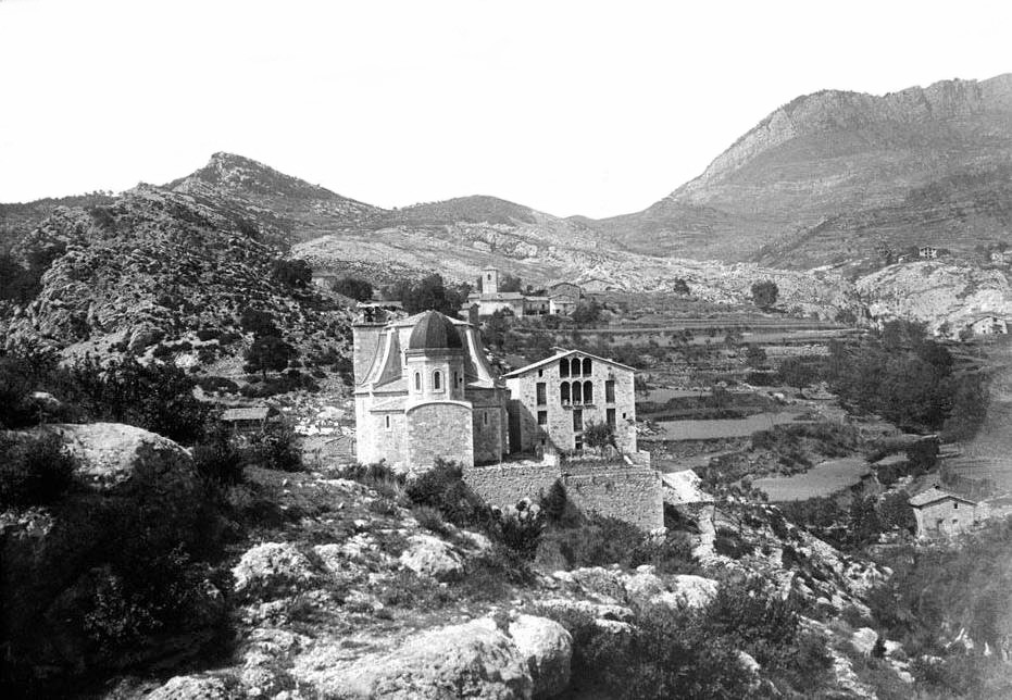 Imatge